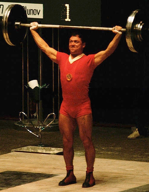 Vladimir Kaplunov, 1964 Olympics